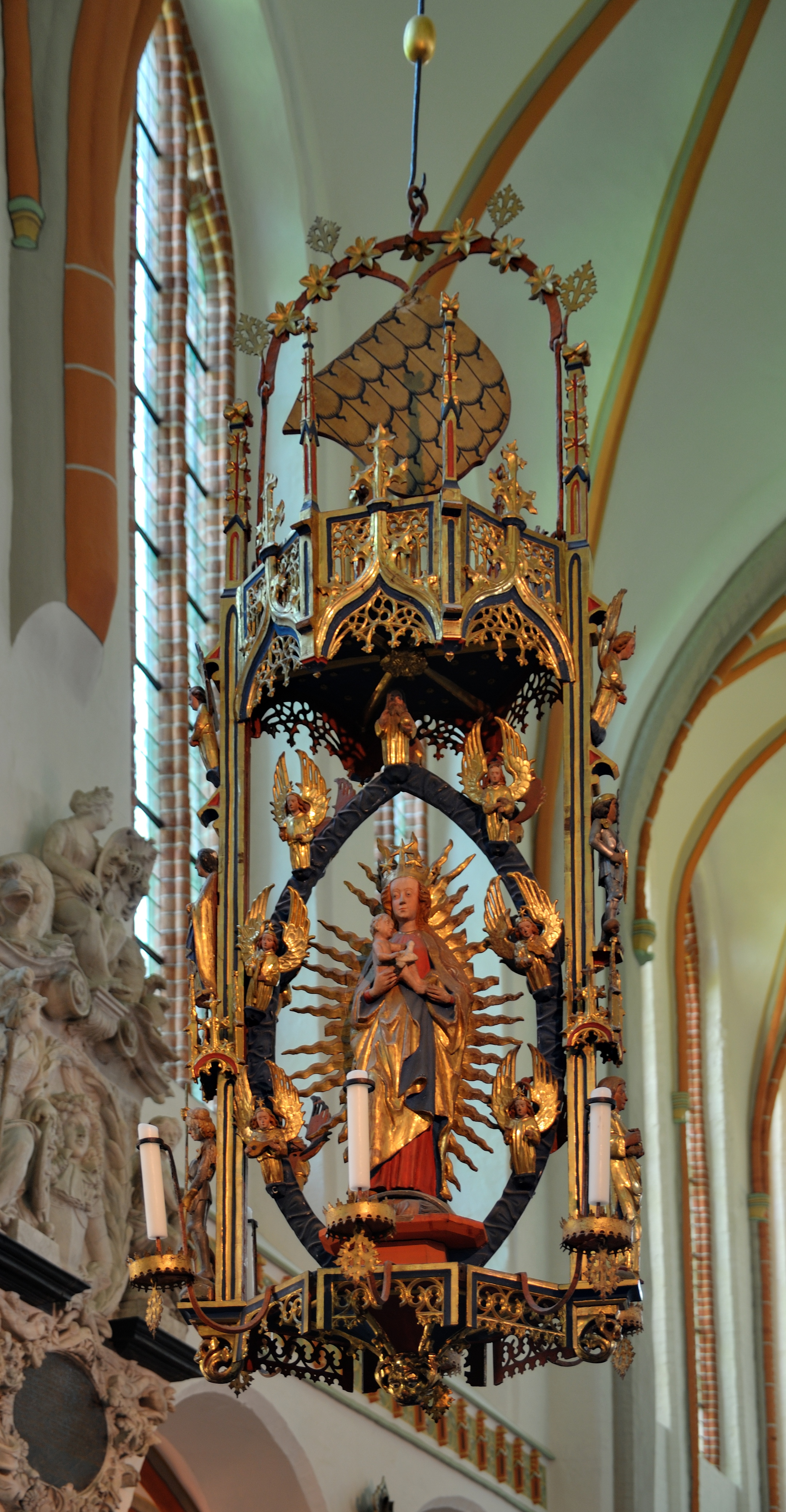 St. Johanniskirche: Marienleuchter